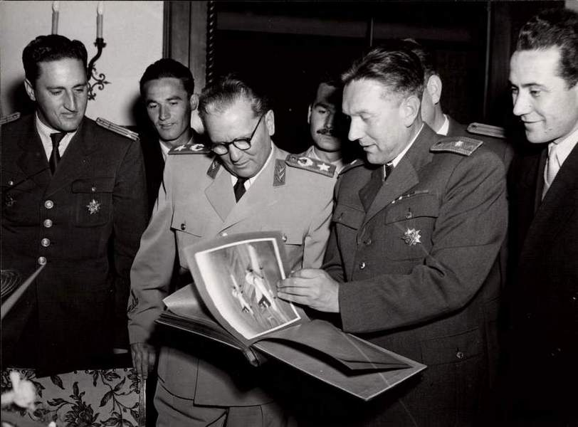 Ладислав Амброжич - Ладо Новљан (Чатеж на Сави, код Брежица, 10. март 1908 — 2004), учесник Народноослободилачког рата и генерал-мајор ЈНА.